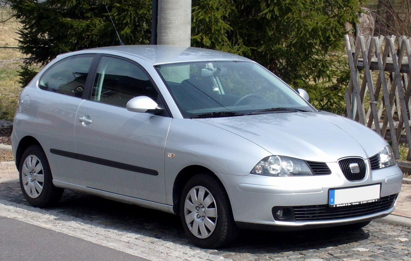 Seat Ibiza three-doors.